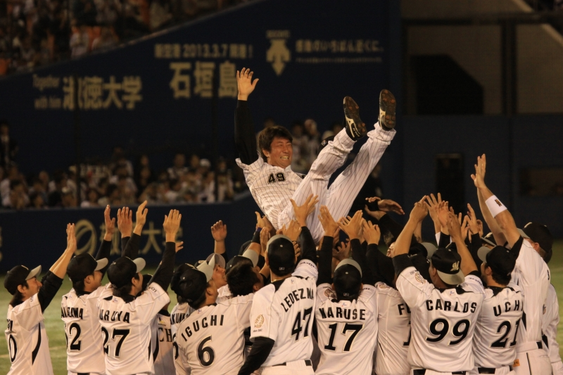 日本プロ野球 千葉ロッテマリーンズ 薮田安彦投手 引退セレモニー 胴上げ